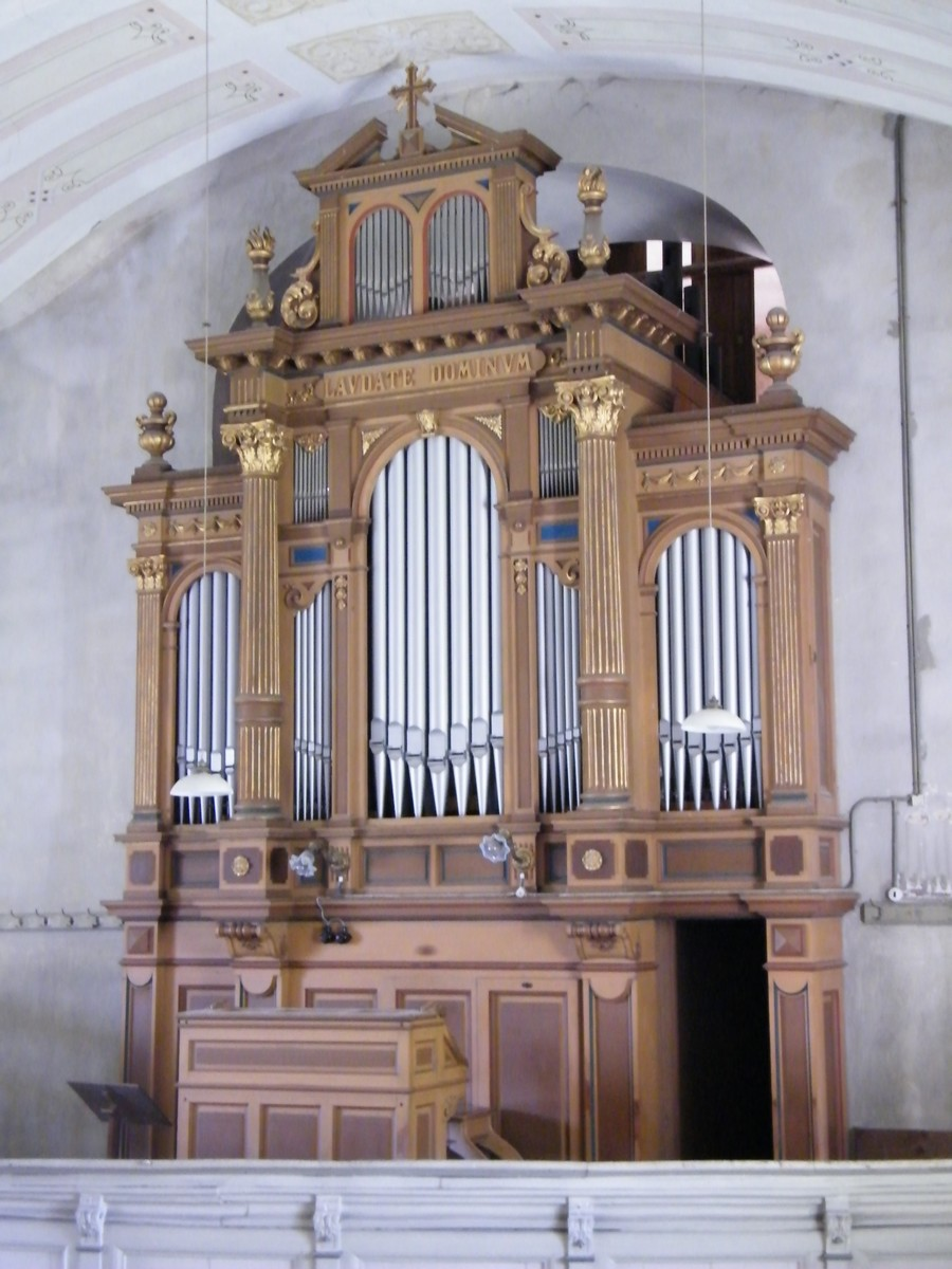 Varhany v kostele Navštívení Panny Marie v Lobendavě